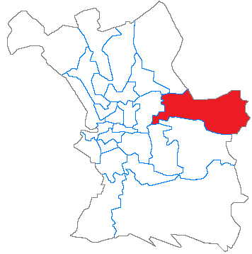 Situation du canton dans la ville de Marseille